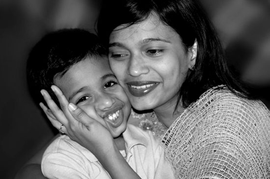 അമ്മയും കുഞ്ഞും